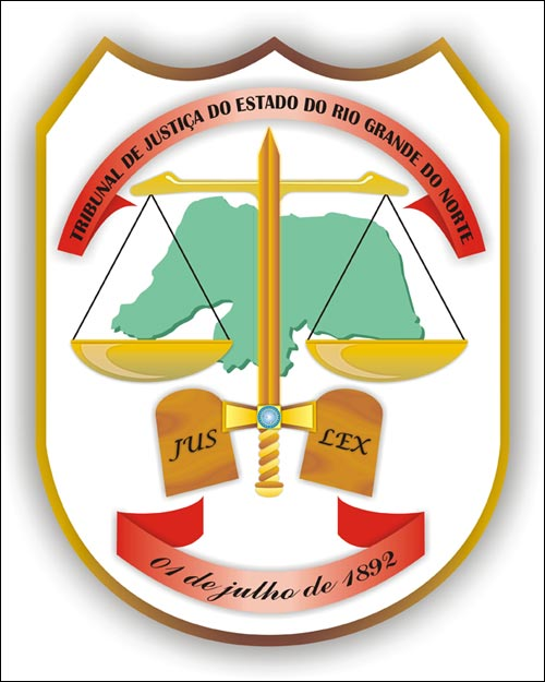 Brasão do Tribunal de Justiça do Estado do Rio Grande do Norte